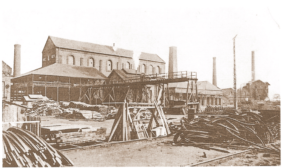 La Fosse n° 4 - 4 bis de la Compagnie des mines de l'Escarpelle était un charbonnage constitué de deux puits situé à Douai (Dorignies), Nord, Nord-Pas-de-Calais, France.